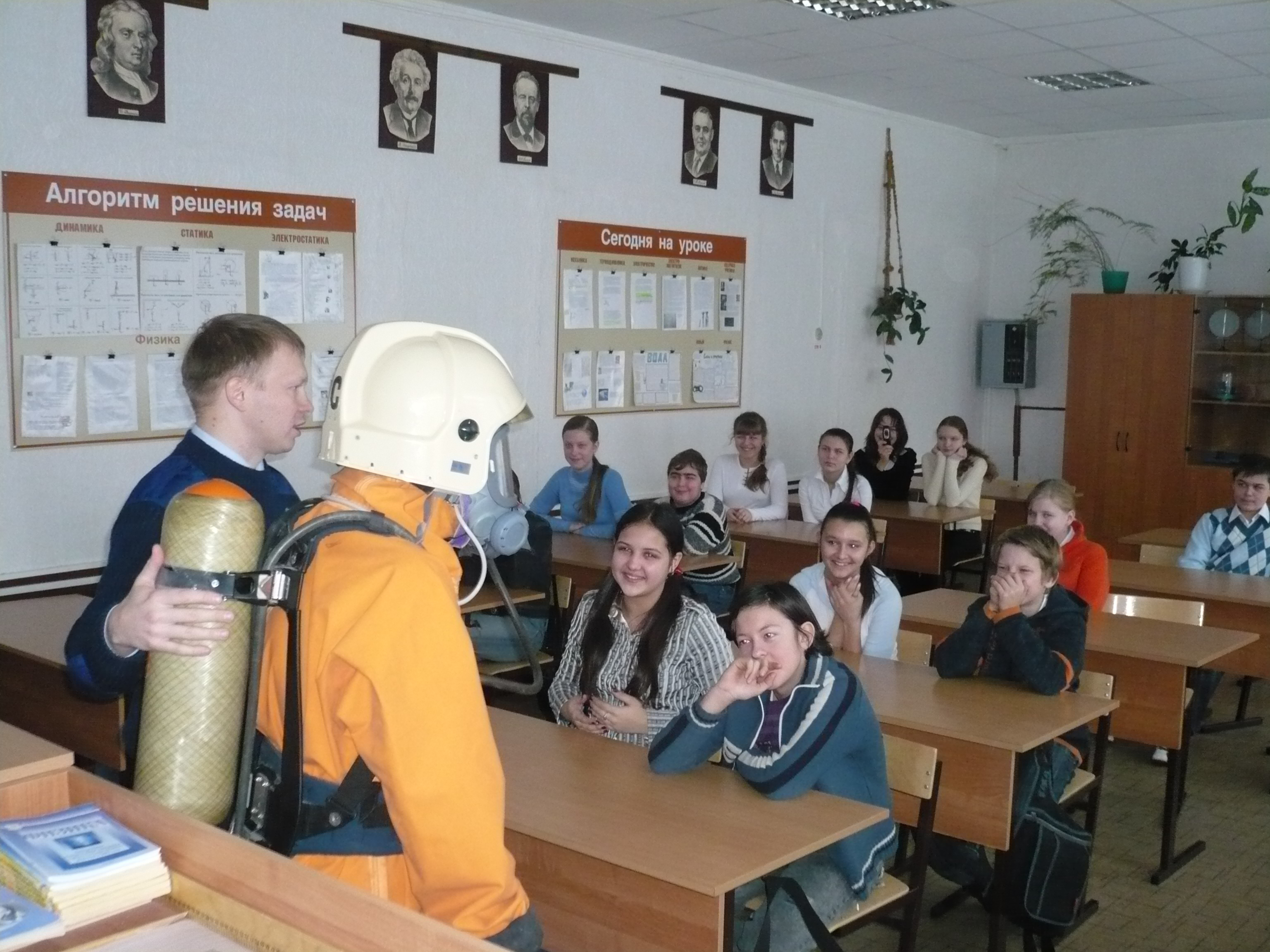 Занятия в школе